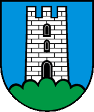 Wappen von Obstalden Kanton Glarus Schweiz